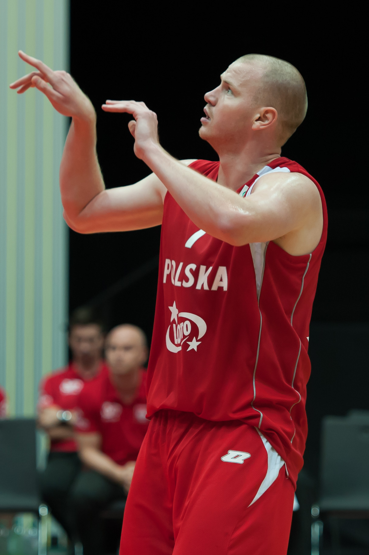 Basketball EM-Qualifikation Österreich gegen Polen Schwechat, 17. August 2014